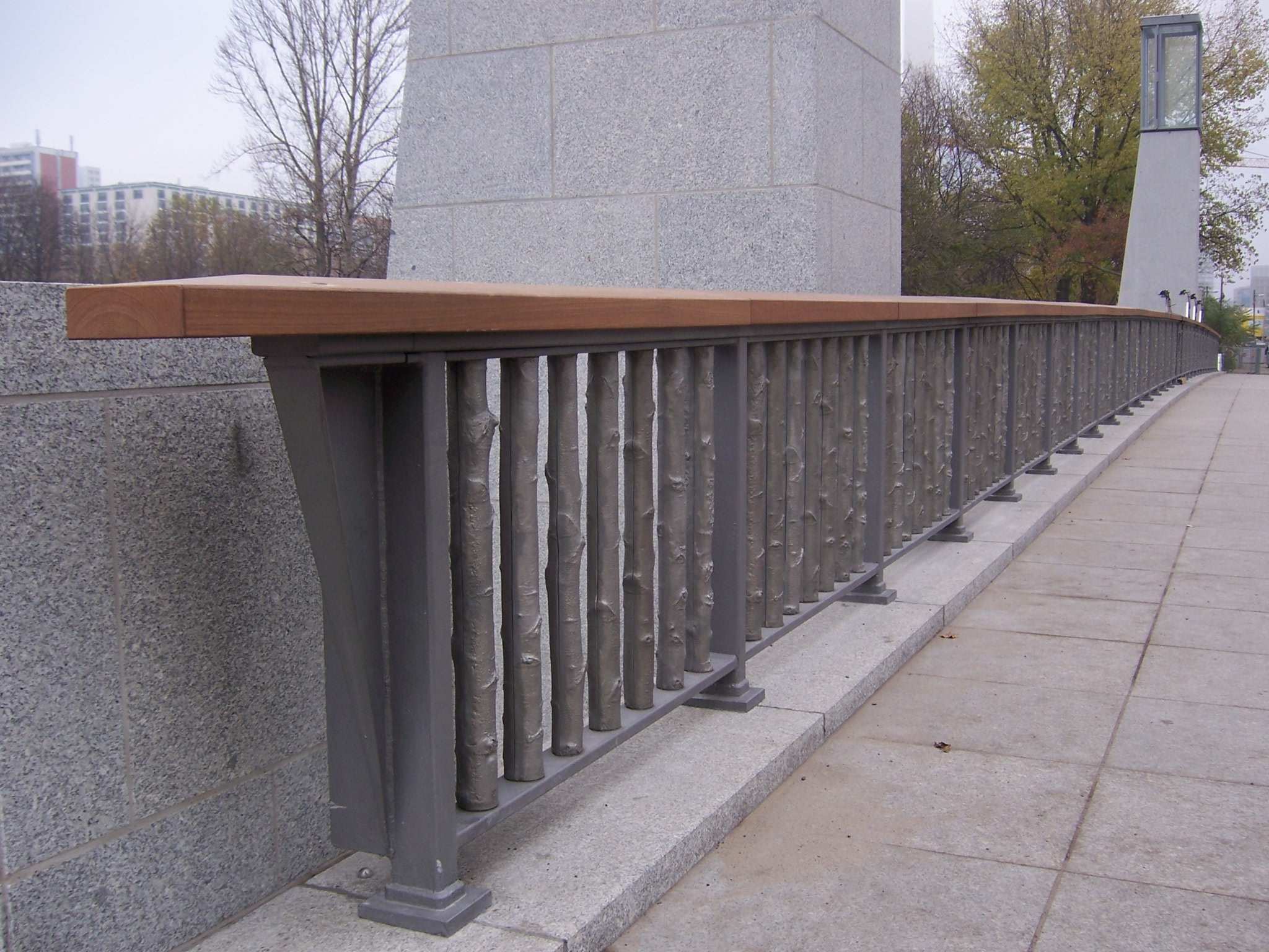 Rathausbrücke Berlin, Geländer